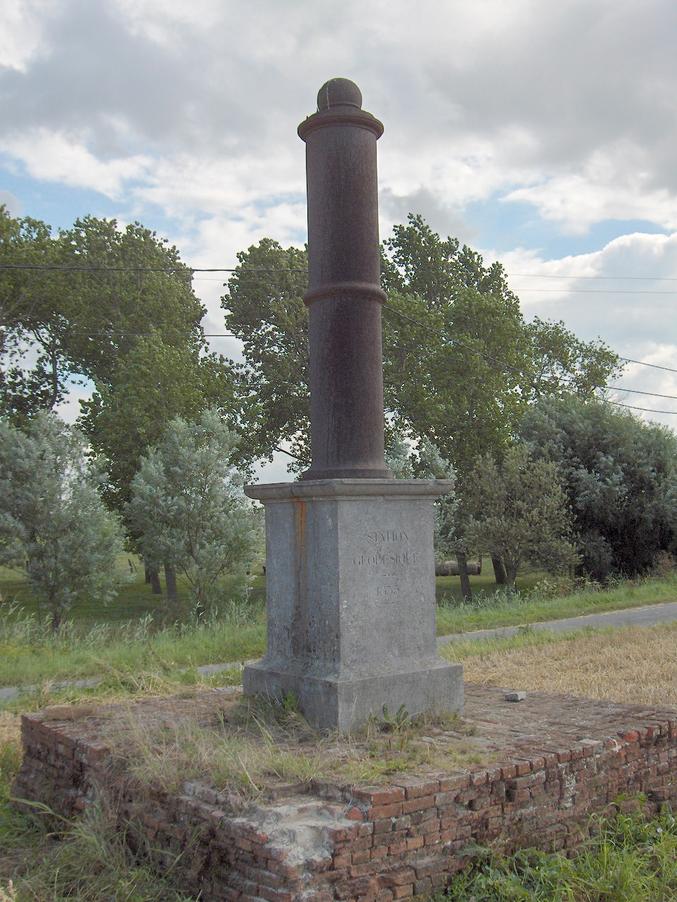 Geodetic point (1855); Stene, Ostend, Belgium